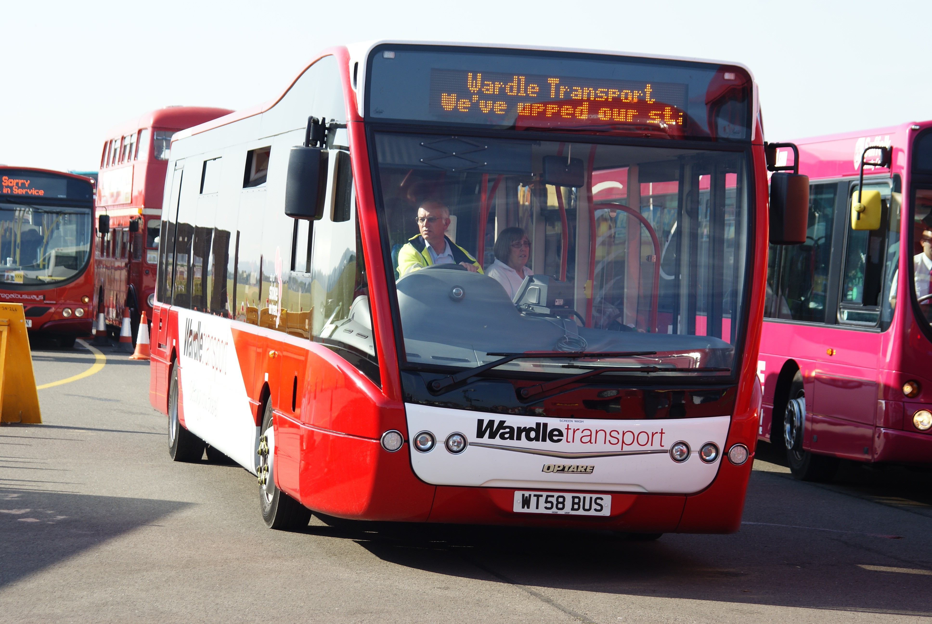 WT58BUS 270909 CPS